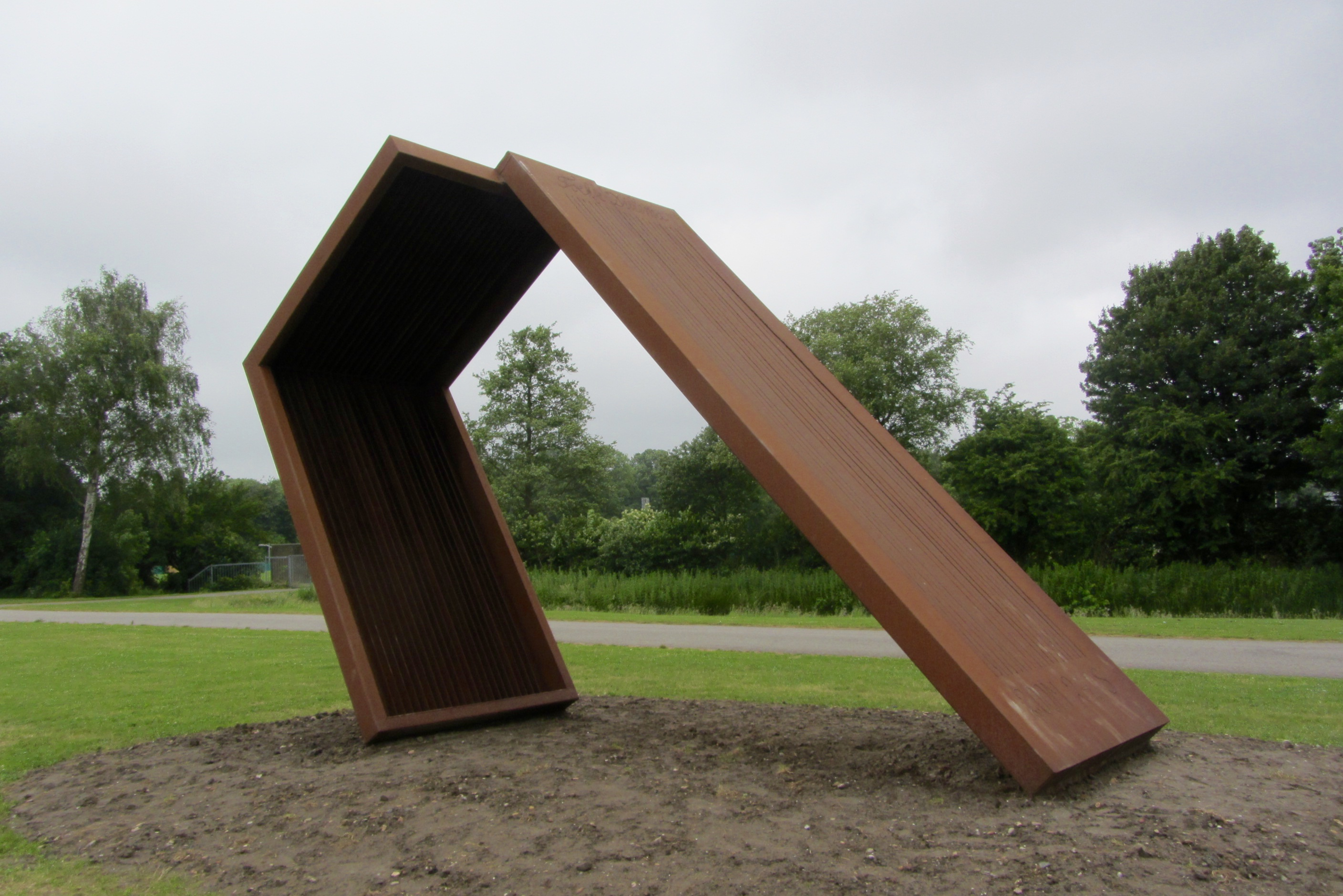 Ids Willemsma, 2014. Deze sculptuur stond aanvankelijk in Oranjewoud voor Museum de Belvedere. Sinds 2018 staat het in Leeuwarden.